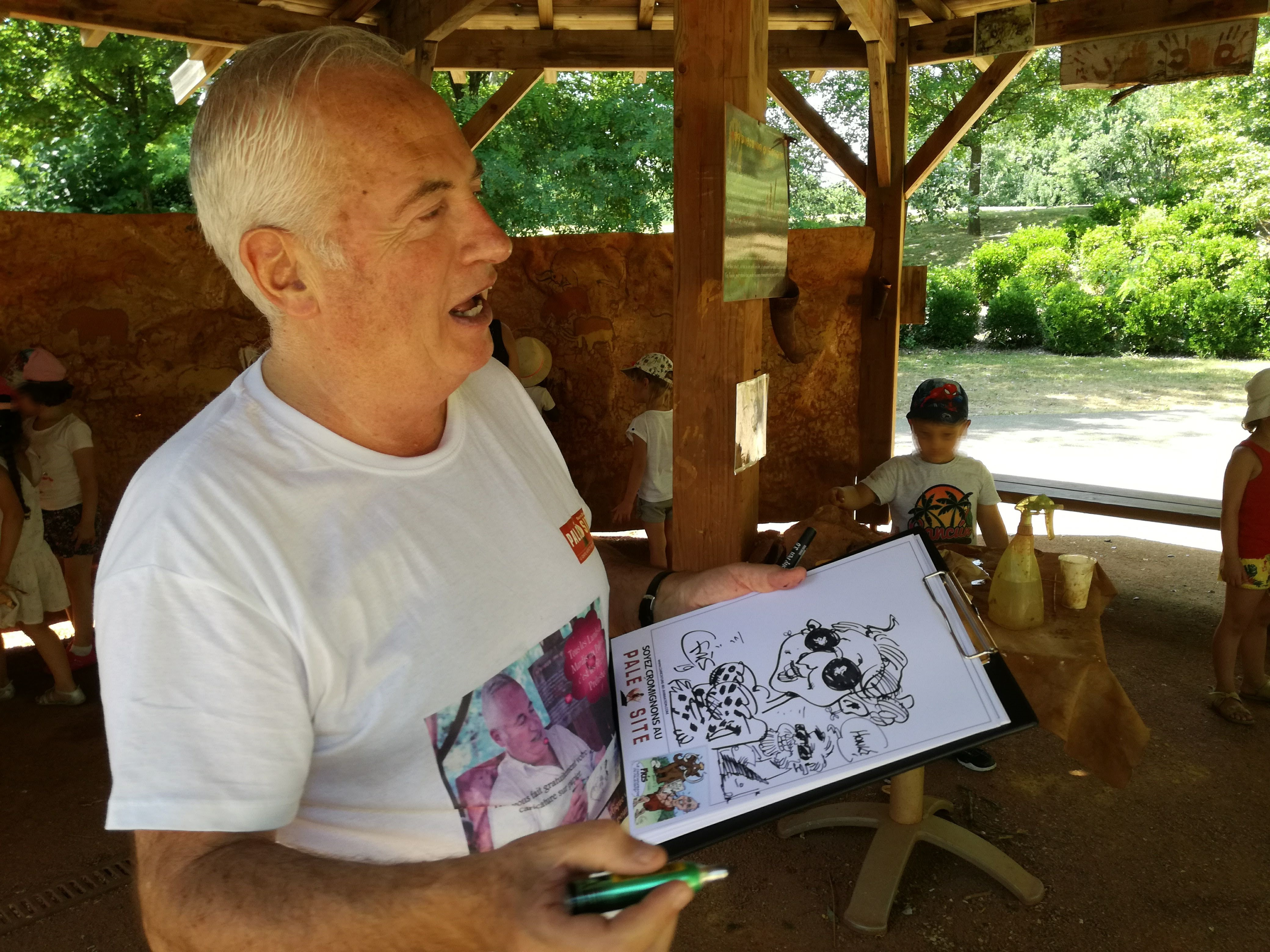 Le dessinateur Fris caricature les visiteurs du Paléosite à Saint-Césaire en juillet 2019